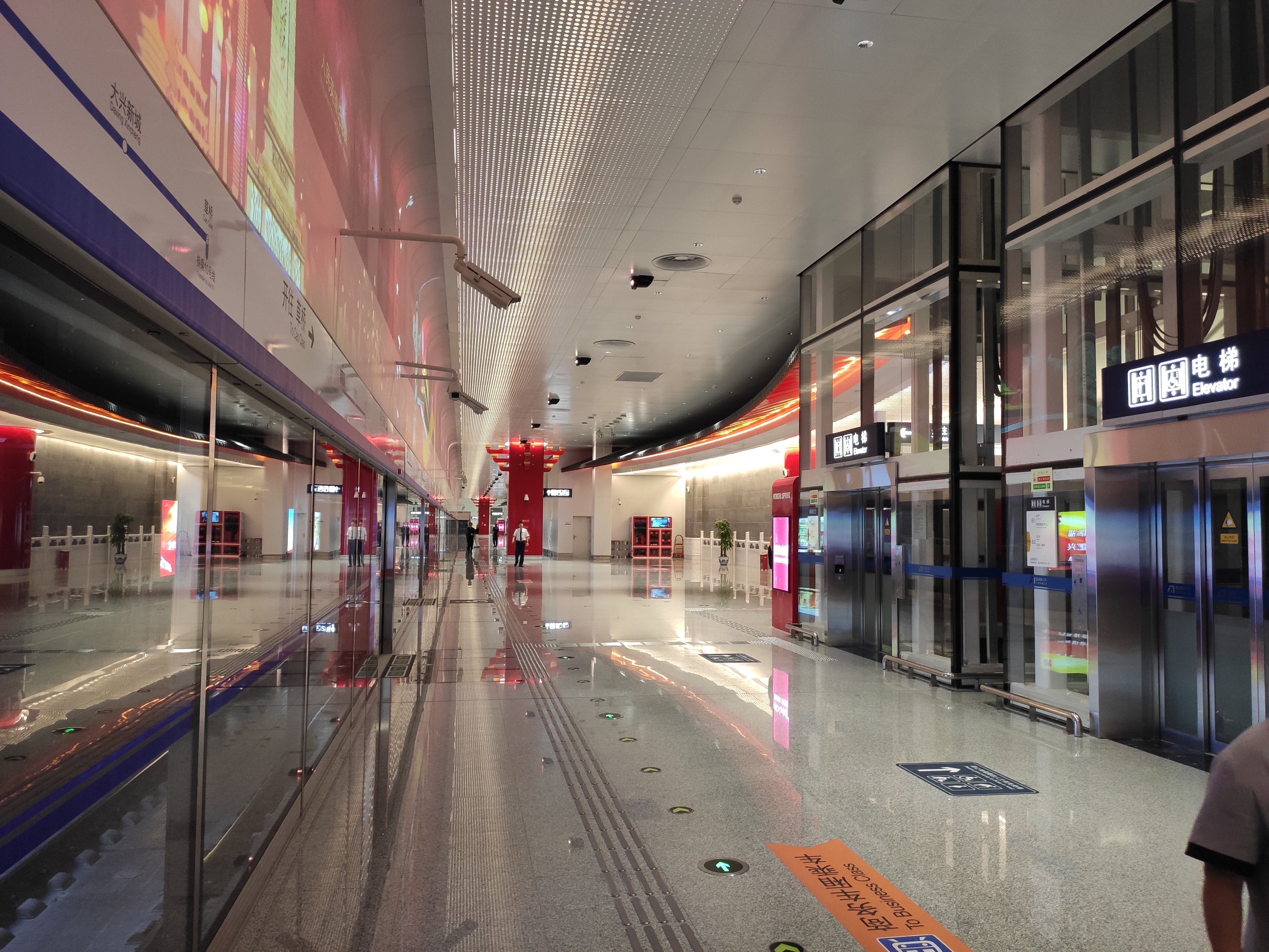 我国首都给世界的第一印象永远是红色的柱子。